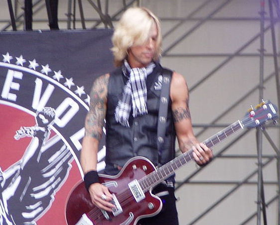 Velvet Revolver at Gods of Metal in 2007